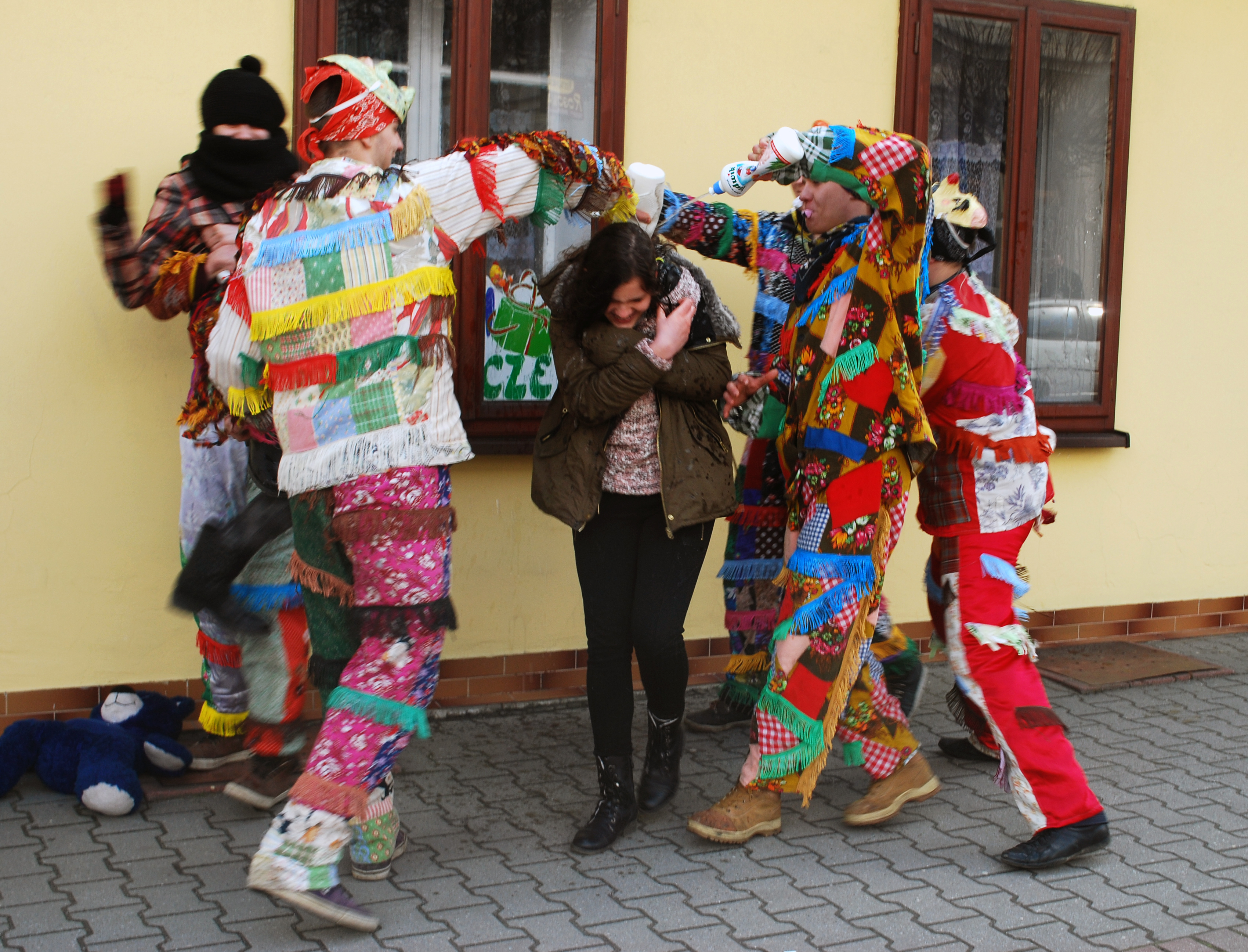 Śmierguśnicy na rynku w lany poniedziałek - polewanie panny